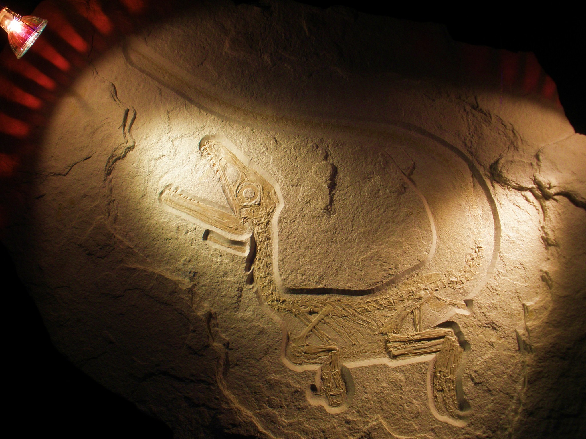 Fossil of Sciurumimus, an extinct theropod- Took the photo at Fossil Show, Munich